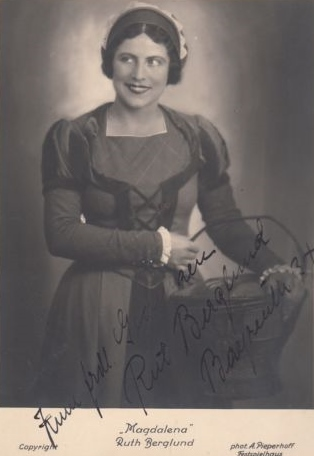 Rut Berglund als Magdalena